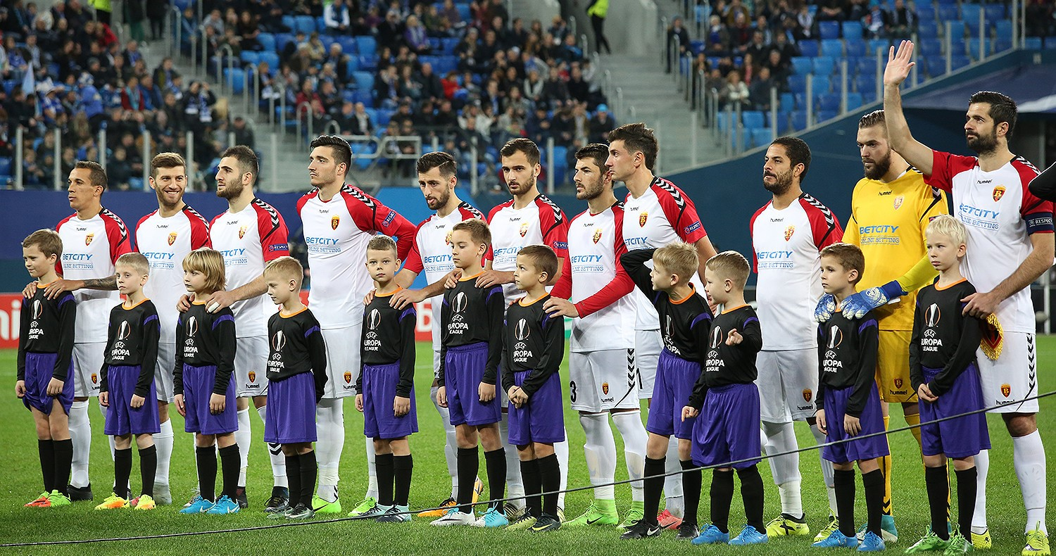 FK Vardar